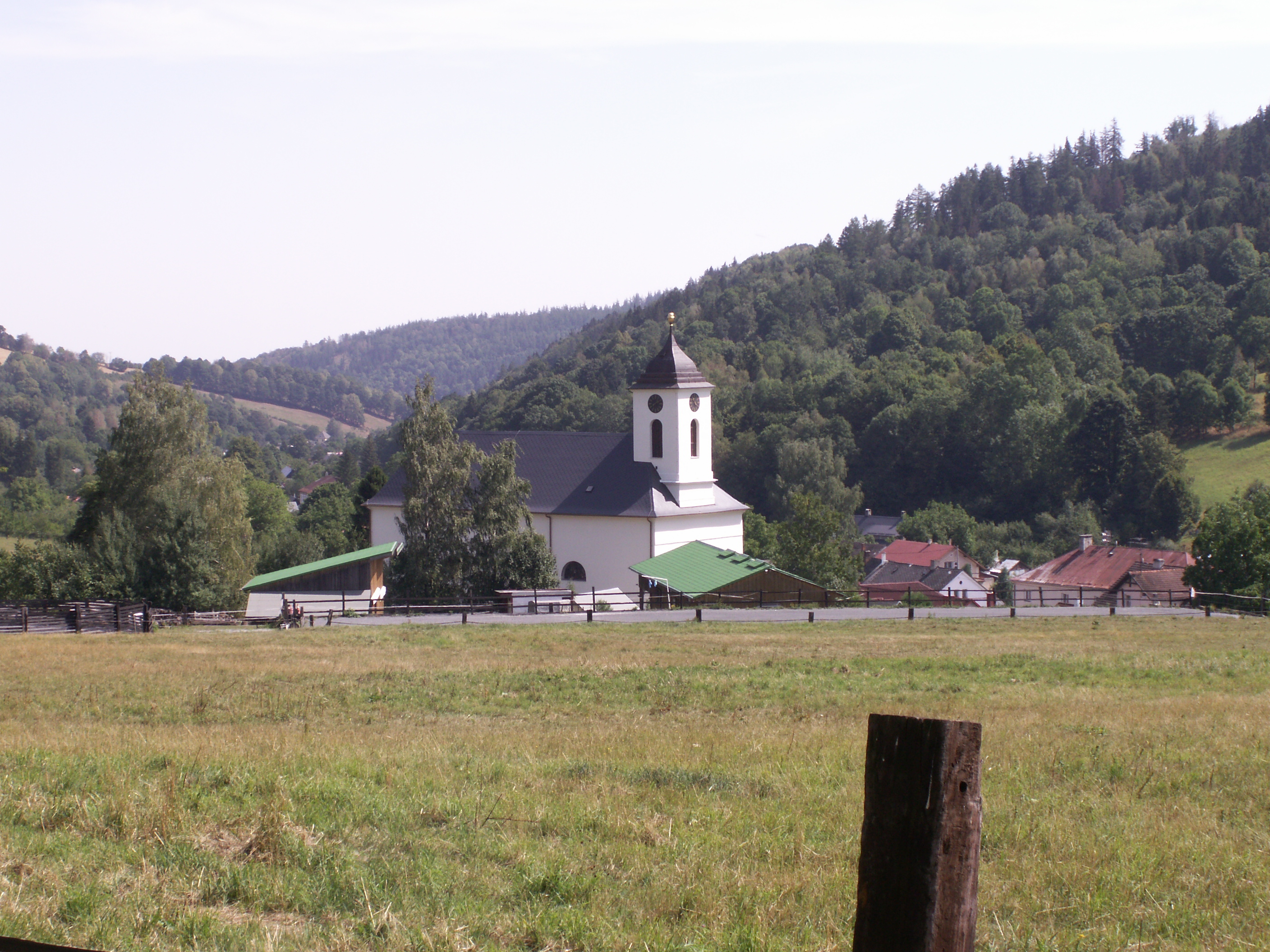 Petrovice, okres Bruntál, kraj Moravskoslezský, pohled ze silnice 457 s kostelem sv. Rocha